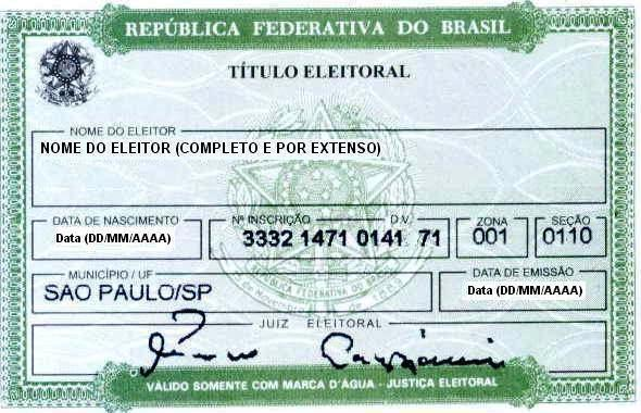 Modelo do anverso do título brasileiro de eleitor Data: 20/01/2006 Fonte: Edição própria de título pessoal